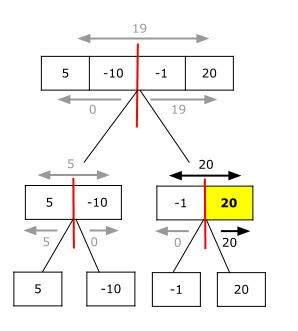 Visualização do cálculo da maior sublista contígua de maior soma a partir de uma lista de 4 elementos por divisão e conquista.